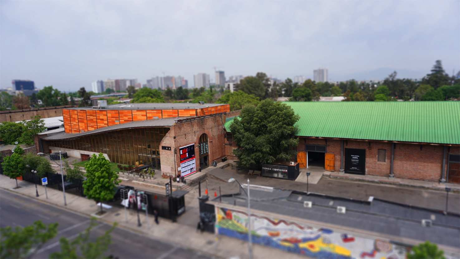 Teatro Principal y Galería de Artes Visuales de Matucana 100